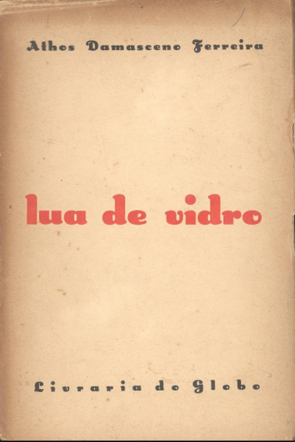 Capa do livro Lua de Vidro de Athos Damasceno